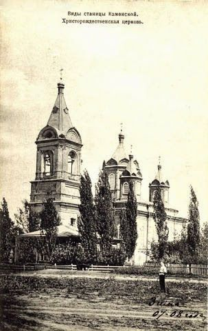 виды станицы Каменской (ныне город Каменск-Шахтинский Ростовской области РФ), храм Христорождественский